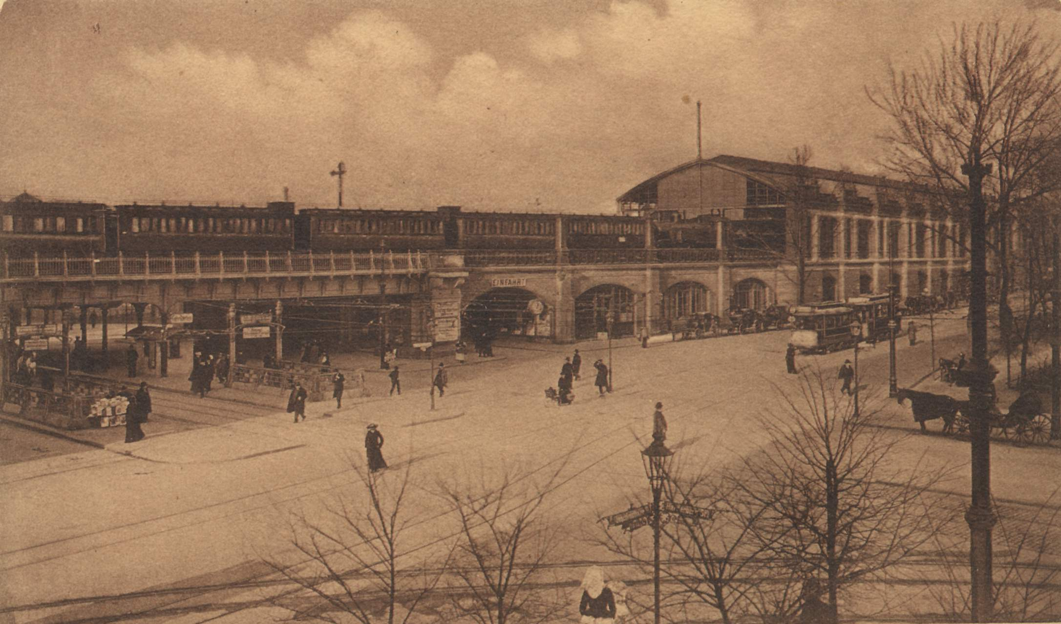 Bahnhof Berlin Zoologischer Garten